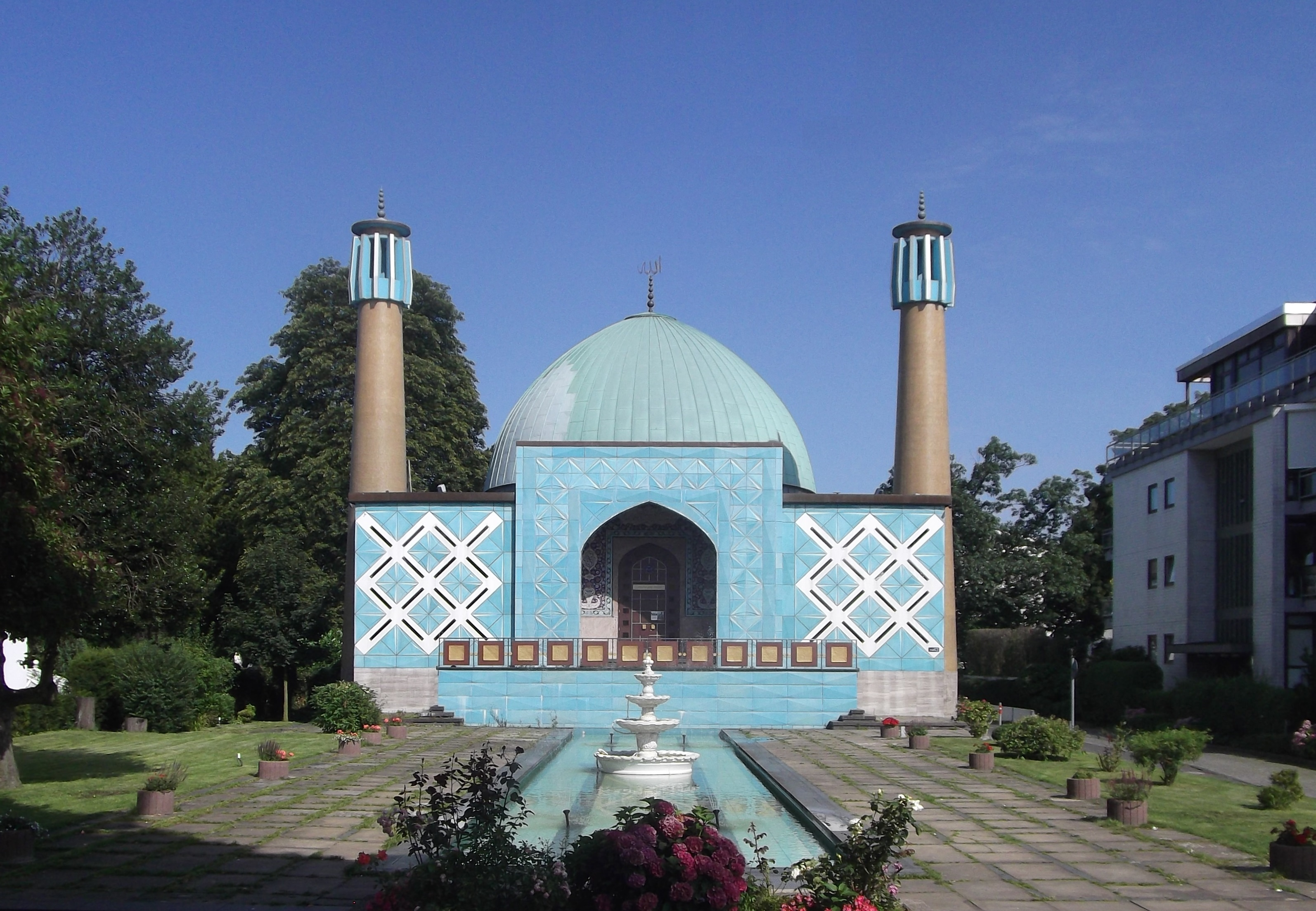 Hamburg, August 2015 This is a photograph of an architectural monument.